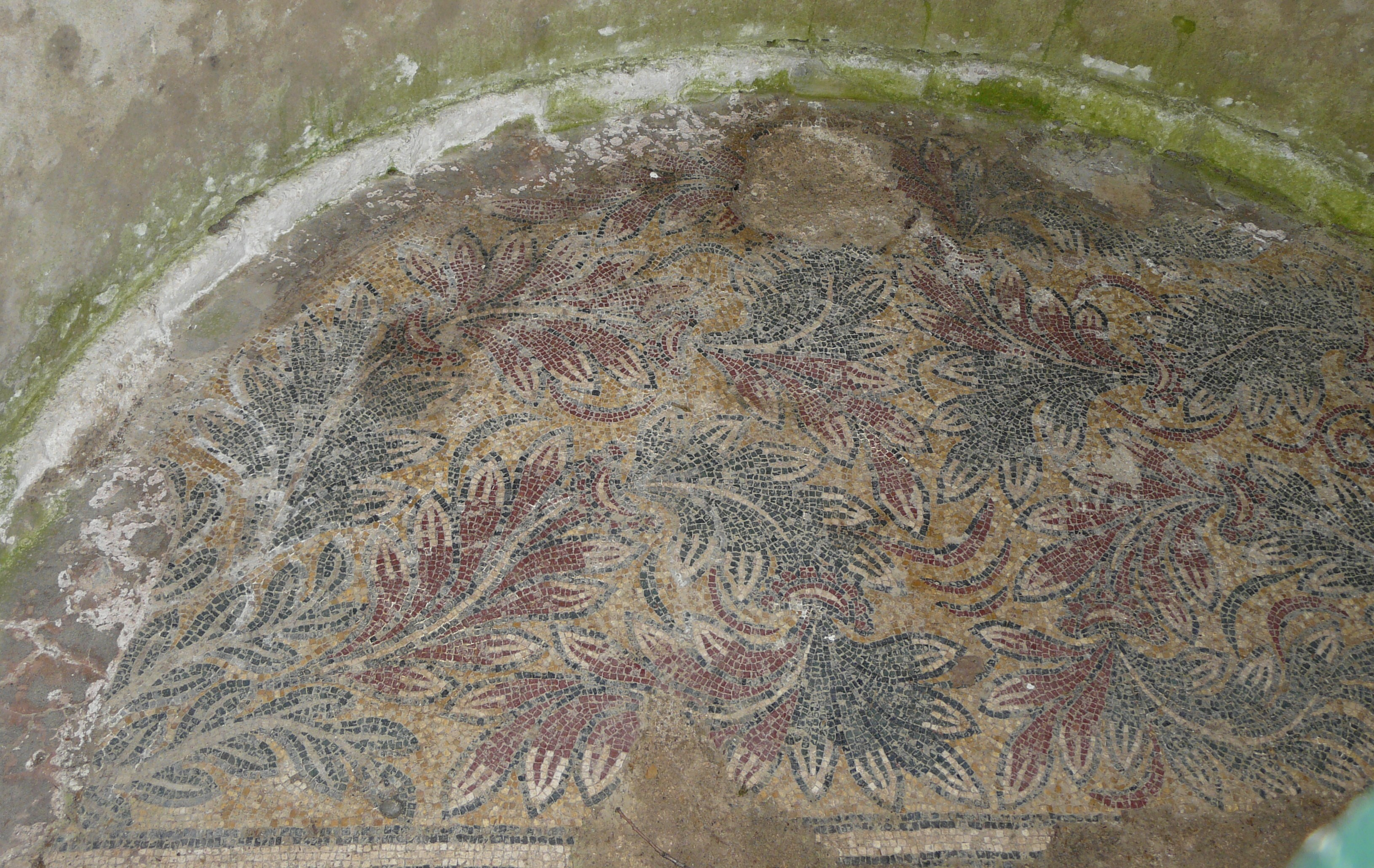 Mosaïques gallo-romaines de Nérac, Lot-et-Garonne, France.